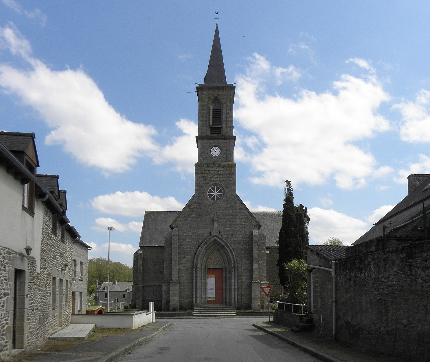 Église Saint-Maudan de Plumaudan (22). Façade occidentale.